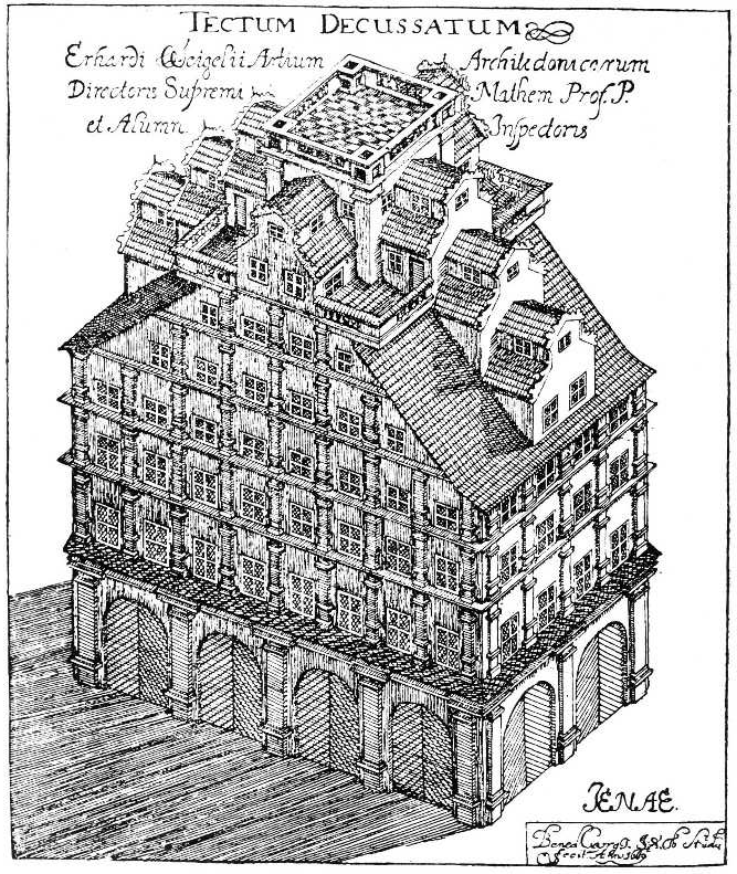 Modellhafte Darstellung des Weigelschen Hauses in Jena auf einer Radierung oder einem Druck von Benedictus Georgi (1669). 17,4 x 13,1 cm Inschrift: TECTUM DECUSSATUM. Erhardi Weigelii Artium Archite donicorum Directoris Supremi Mathem. Prof.P. et Alumn. Inspectoris., Anbringungsort: oberhalb des Druckes Inschrift: IENAE, Anbringungsort: rechts unter dem Druck Inschrift: Bened.Georgis.S.S.Th.Studio.fecit Anni 1669, Anbringungsort: unten rechts Jena, Städtische Museen Jena, Graphische Sammlung, Inventar-Nr. 4710, Schlagwort: Weigelsches Haus Ikonographie (Iconclass)